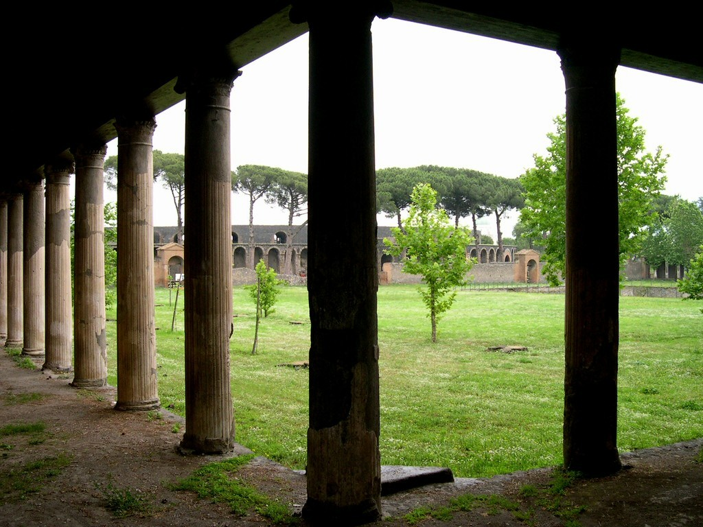 Pompei, Palestra Grande